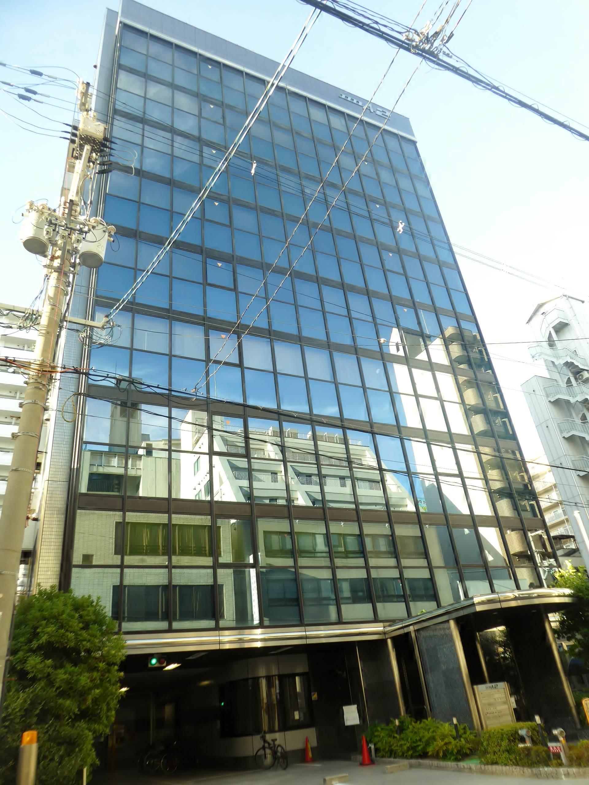 イイダ2ビルを撮影。